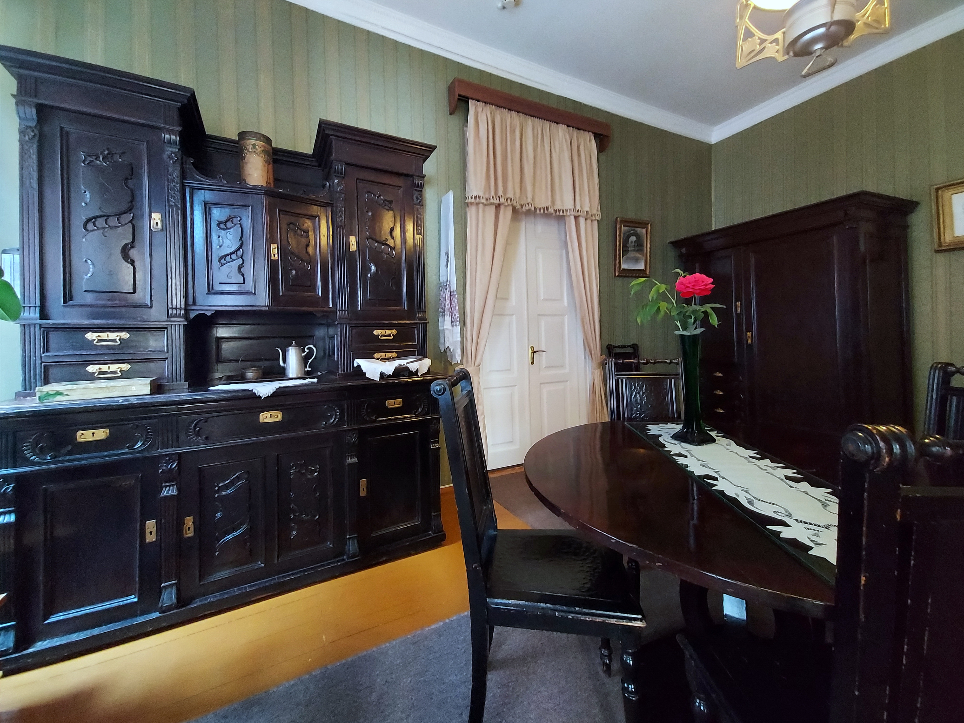 Шкільна їдальня